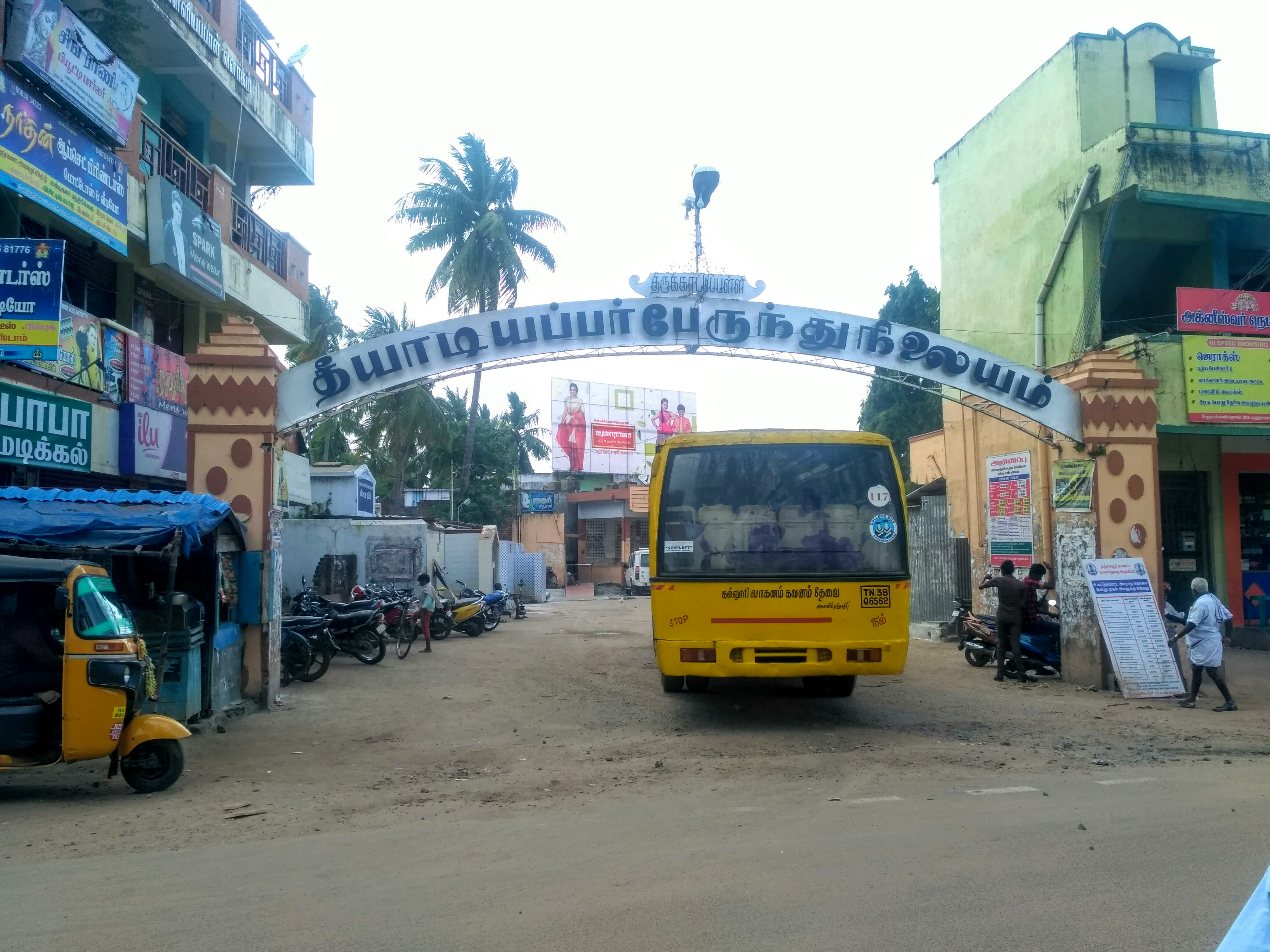 திருக்காட்டுப்பள்ளி பேருந்து நிலையத்தின் நுழைவாயில் ..